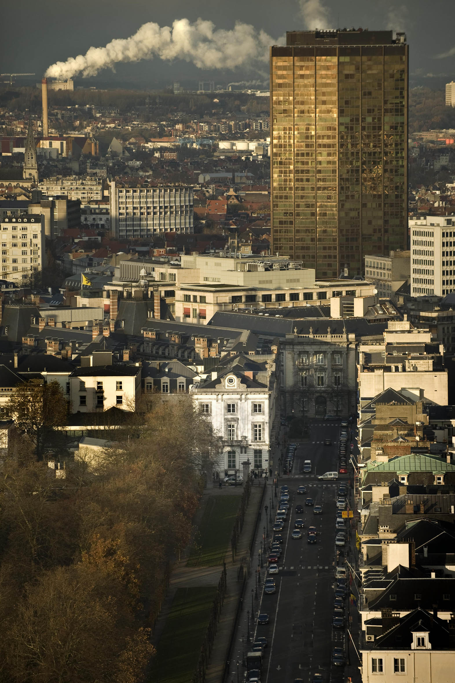 Brussel, Hertogsstraat en Wetstraat, 16 (midden foto) het Kabinet en de Kanselarij van de premier (eerste minister) van België.